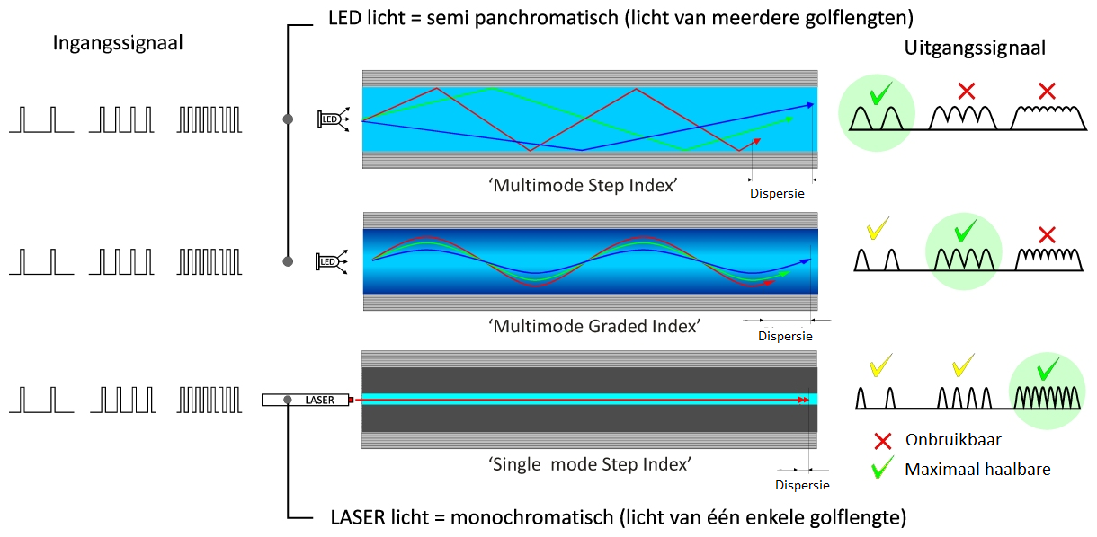 Vergelijking tussen multimode en single mode glasvezel kabel